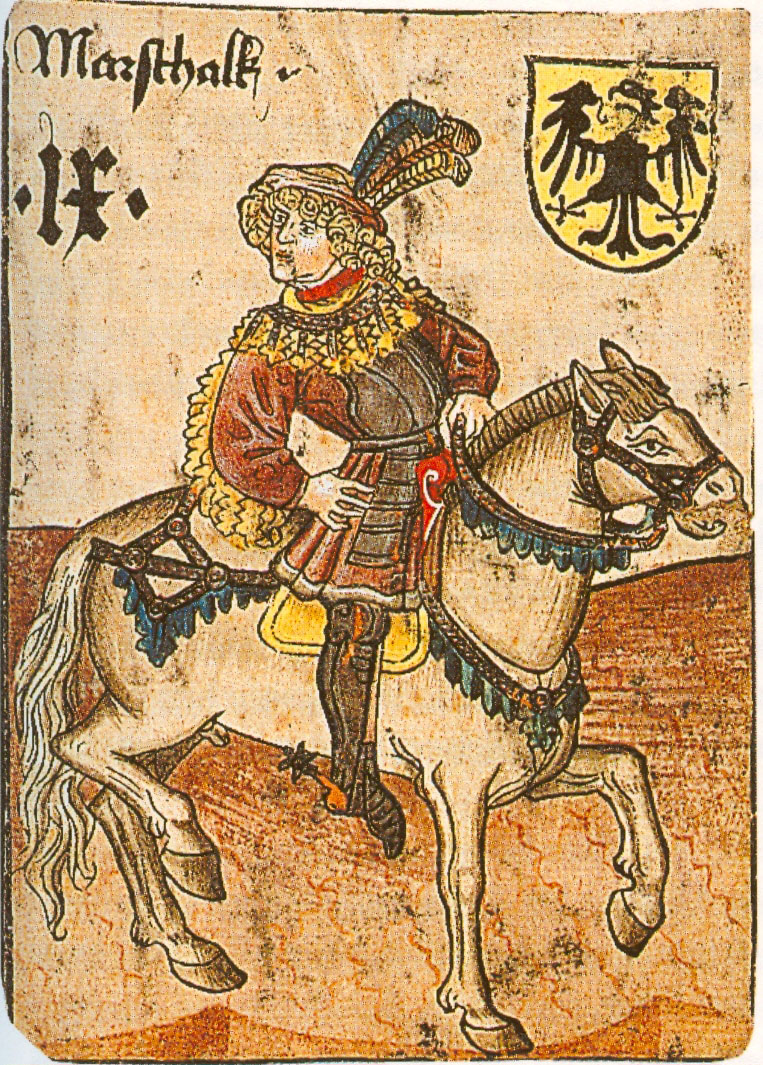 Marschall Kartenspiel (möglicherweise aus dem Besitz Ladislaus Postumus)